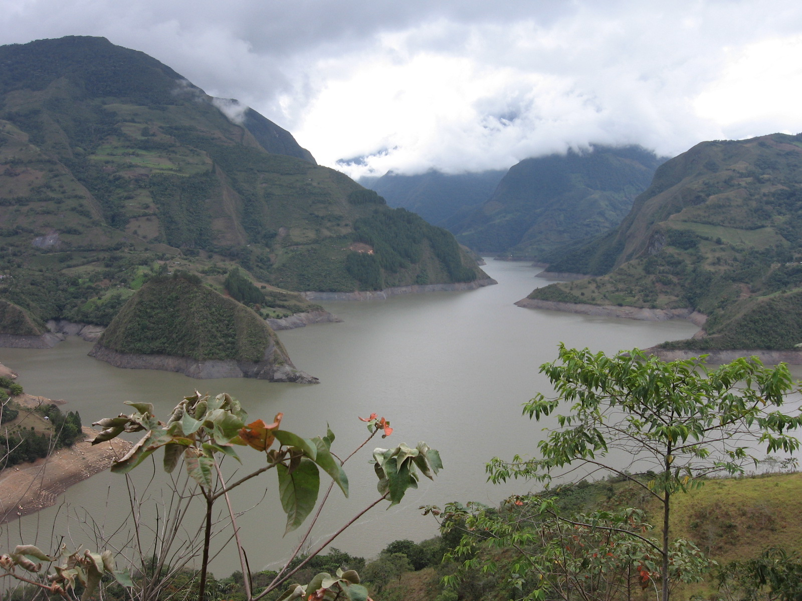 Panorámica del embalse la esmeralda Boyacá Colombia